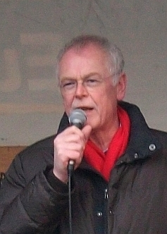 Andreas Meyer-Lauber, DGB NRW - Düsseldorf (Germany)